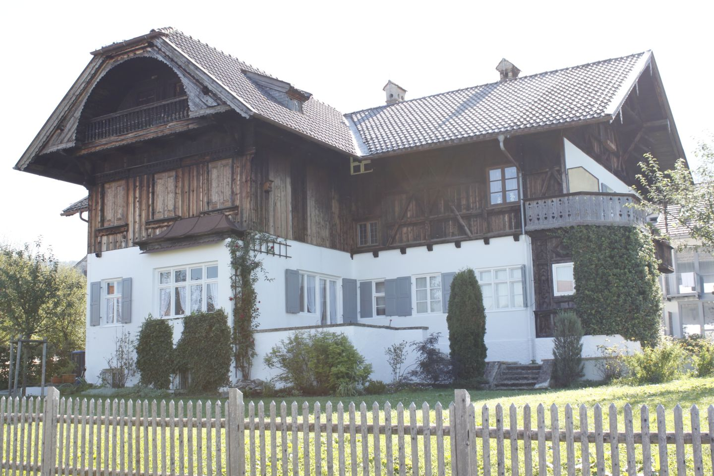 Atelierhaus This is a photograph of an architectural monument.